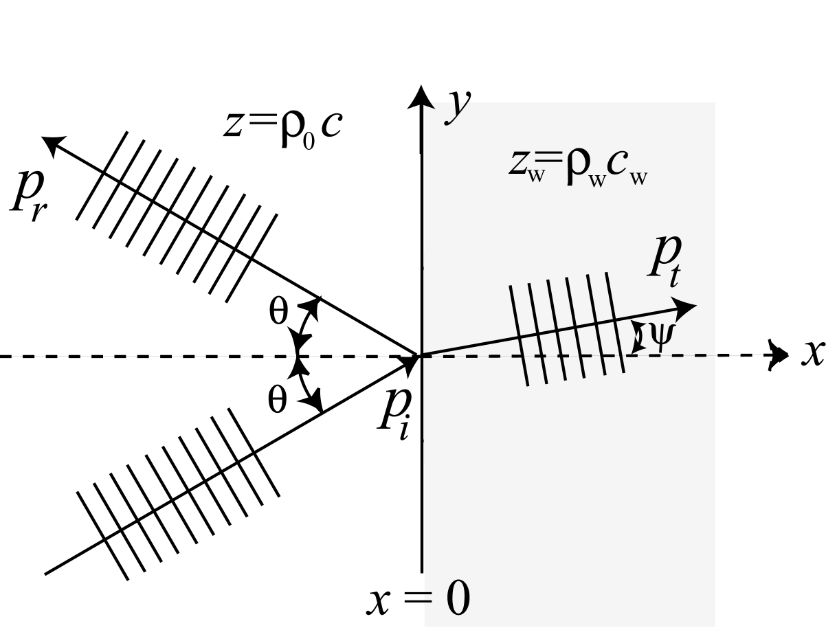 Skrått innfall av lydbølge mot vegg.